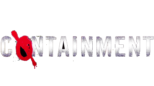 containment